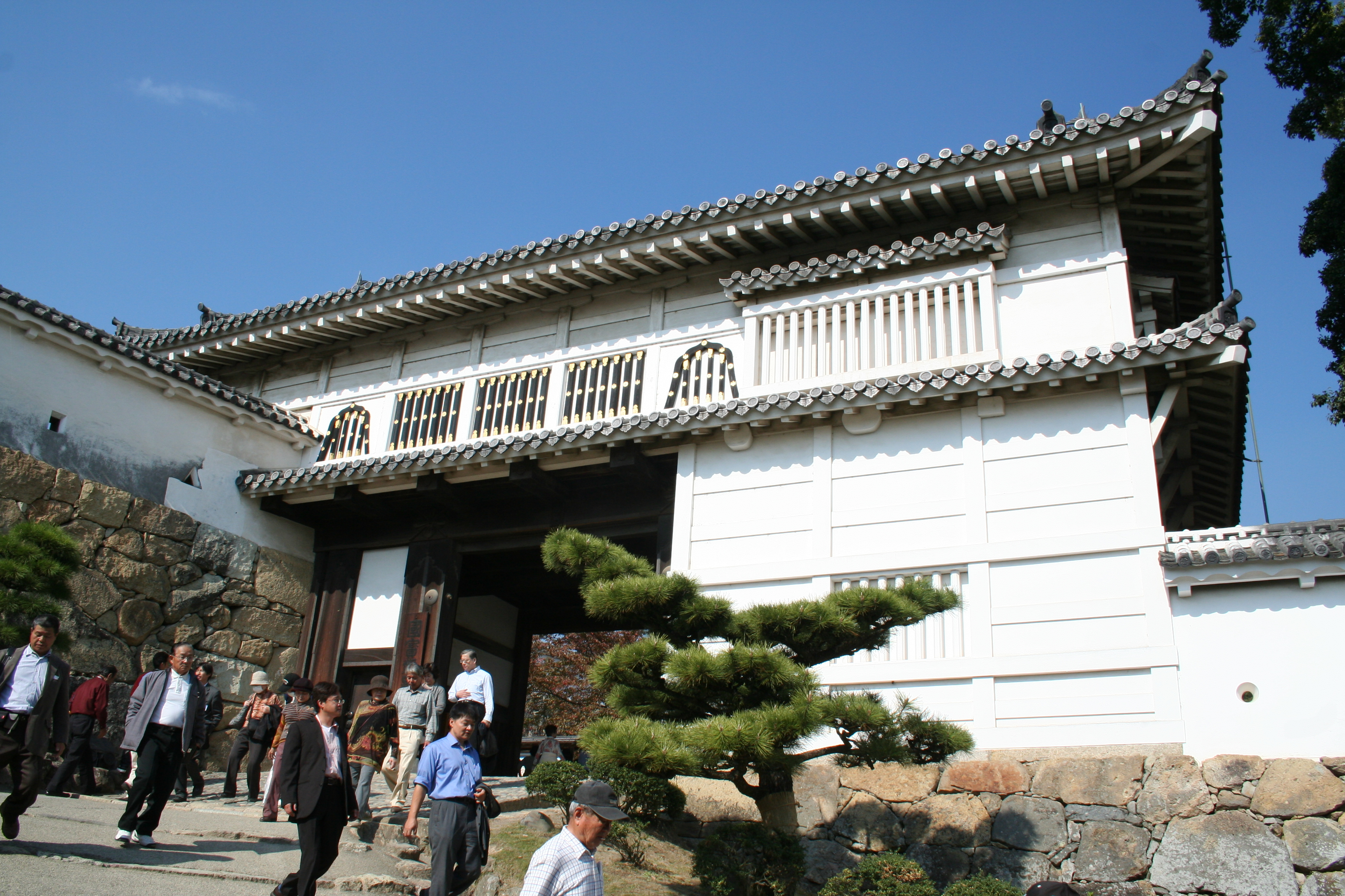 2009年秋の姫路城。 菱の門。門の名前は門にある菱の飾りに由来している。